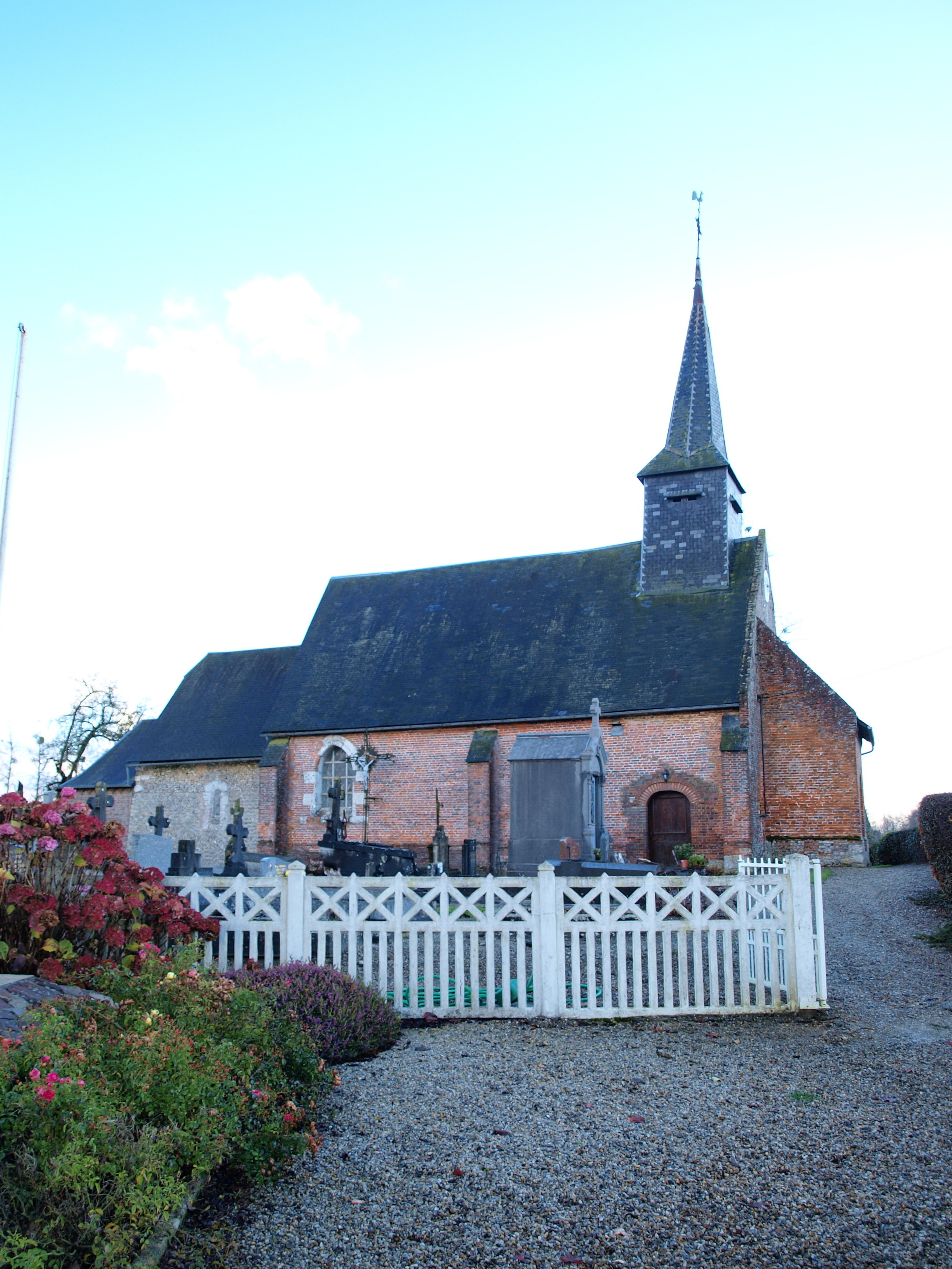 Nullemont (Seine-Maritime , France) ; l'église